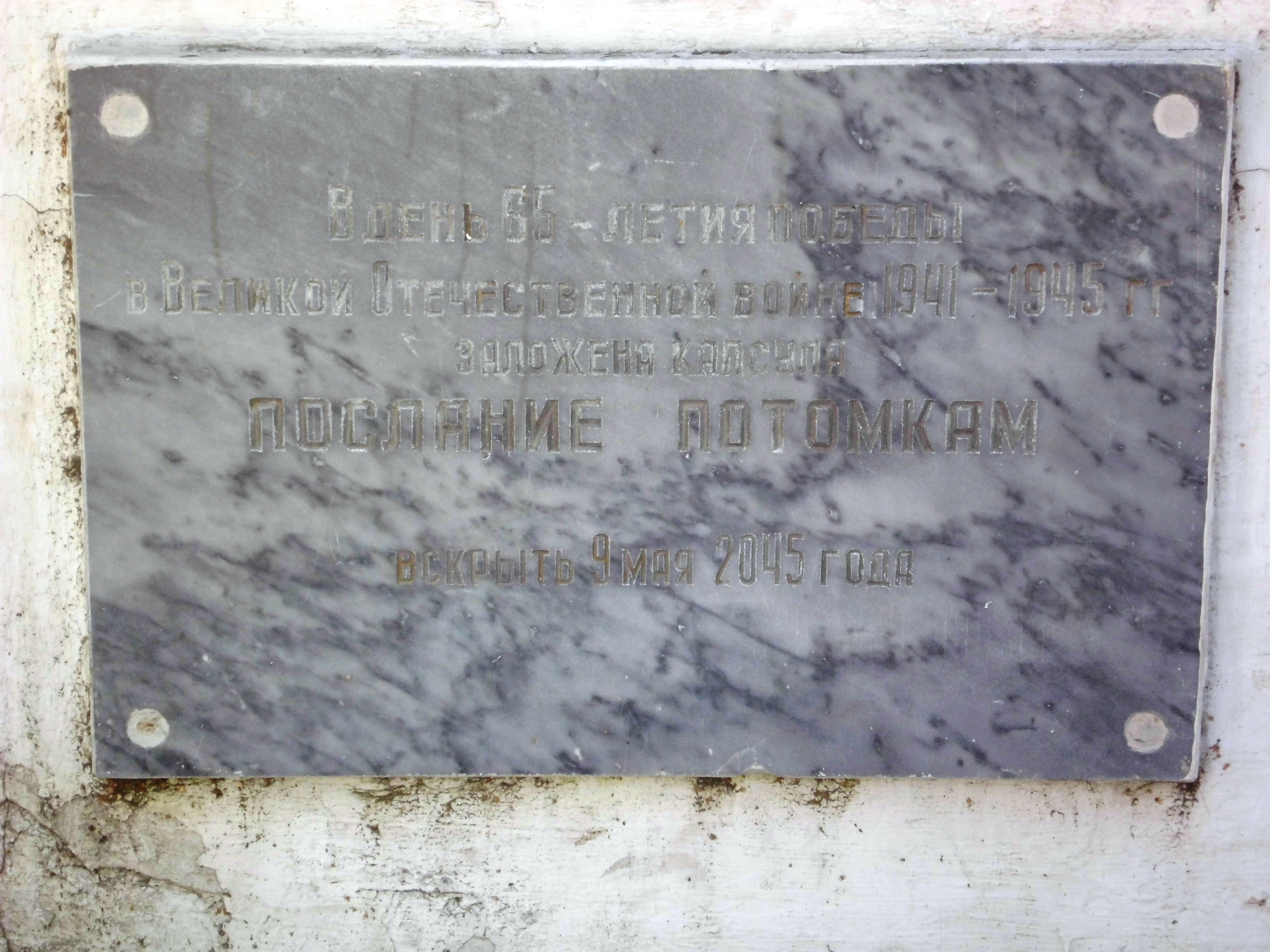 Мемориальный комплекс погибшим в эвакогоспиталях от ран в годы ВОВ. Памятник "Скорбящие матери". Памятная табличка. Лесное кладбище, Челябинск, Челябинская область.